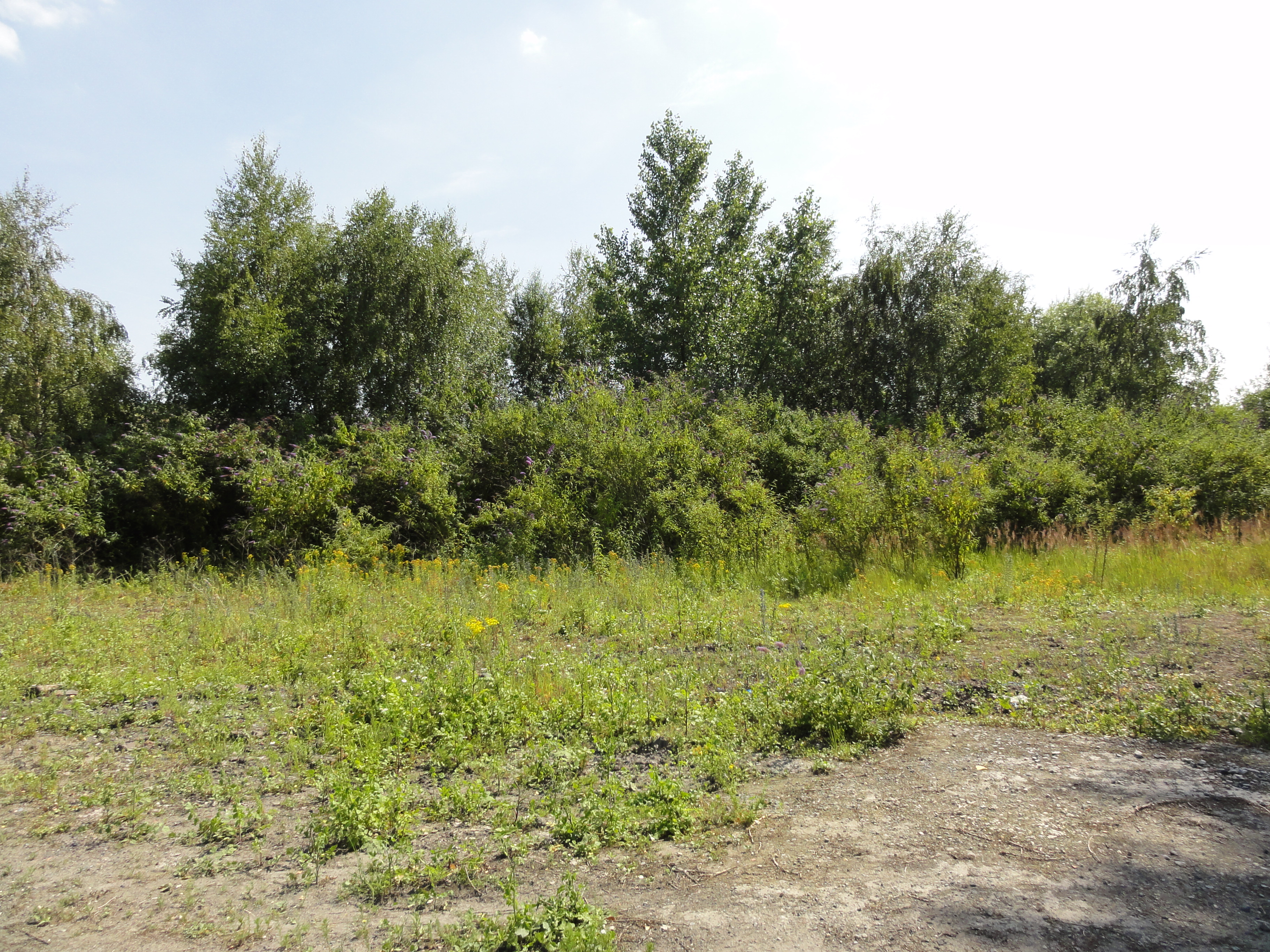 Terril n° 140A dit Marais du Vivier Est, disparu, Compagnie des mines de l'Escarpelle dans le bassin minier du Nord-Pas-de-Calais, Auby, Nord, Nord-Pas-de-Calais, France.